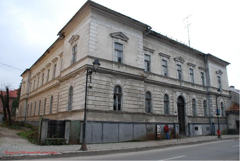 Judecătoria de plasă, azi locuință